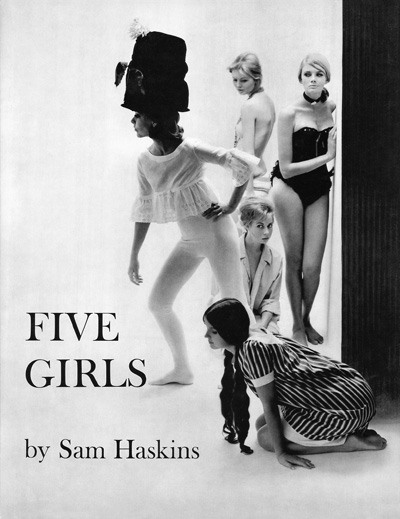 Titelbild des Bildbandes Five Girls